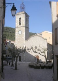 Eglise de Claviers 83